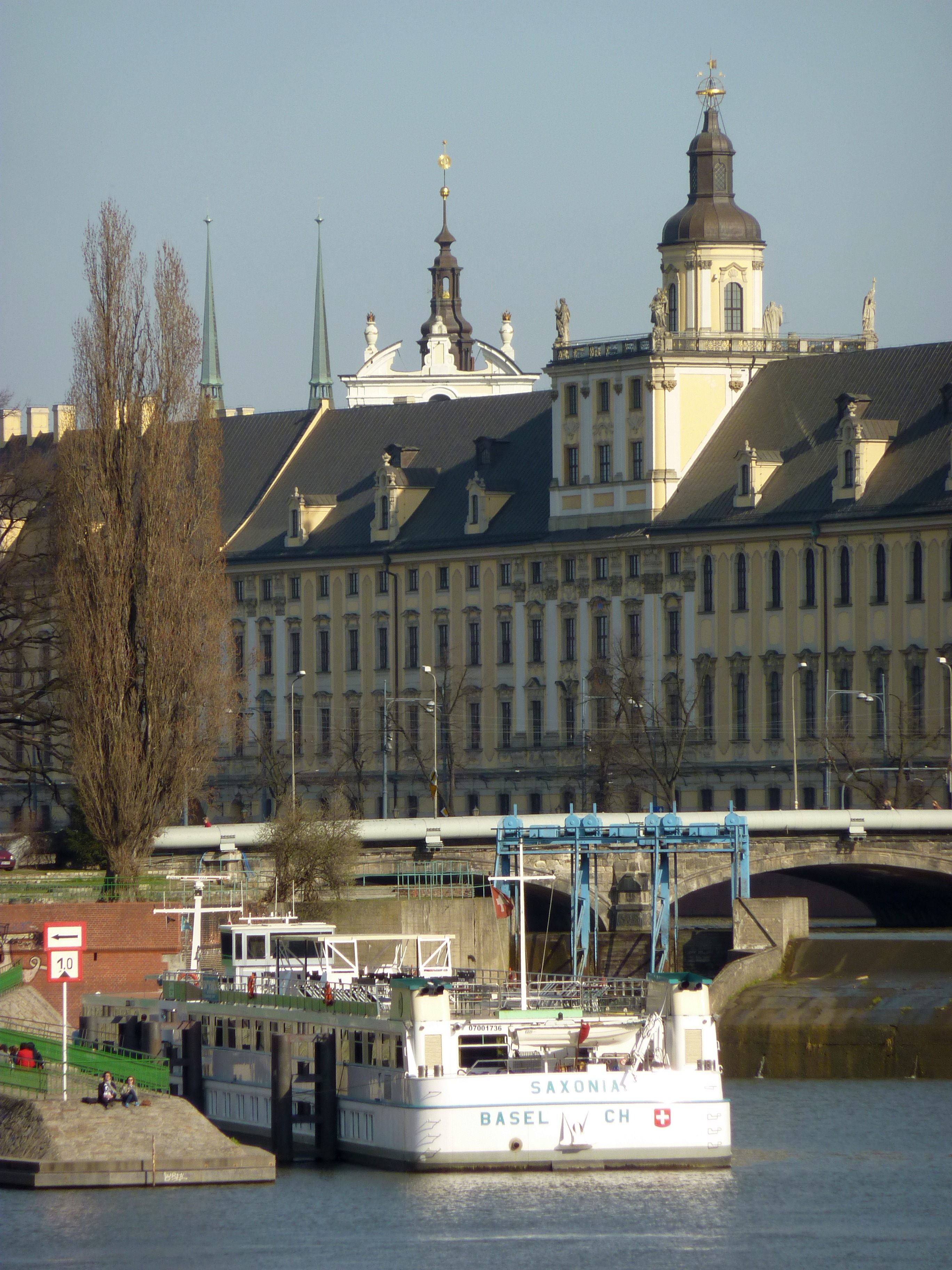 Statek wycieczkowy Saxonia (bandera szwajcarska, port macierzysty Bazylea) zacumowana przy Jazie Elektrowni Wodnej Południowej, nieopodal Uniwersytetu Wrocławskiego (gmach główny widoczny na ostatnim planie). Fotografia wykonana z Mostu Sikorskiego